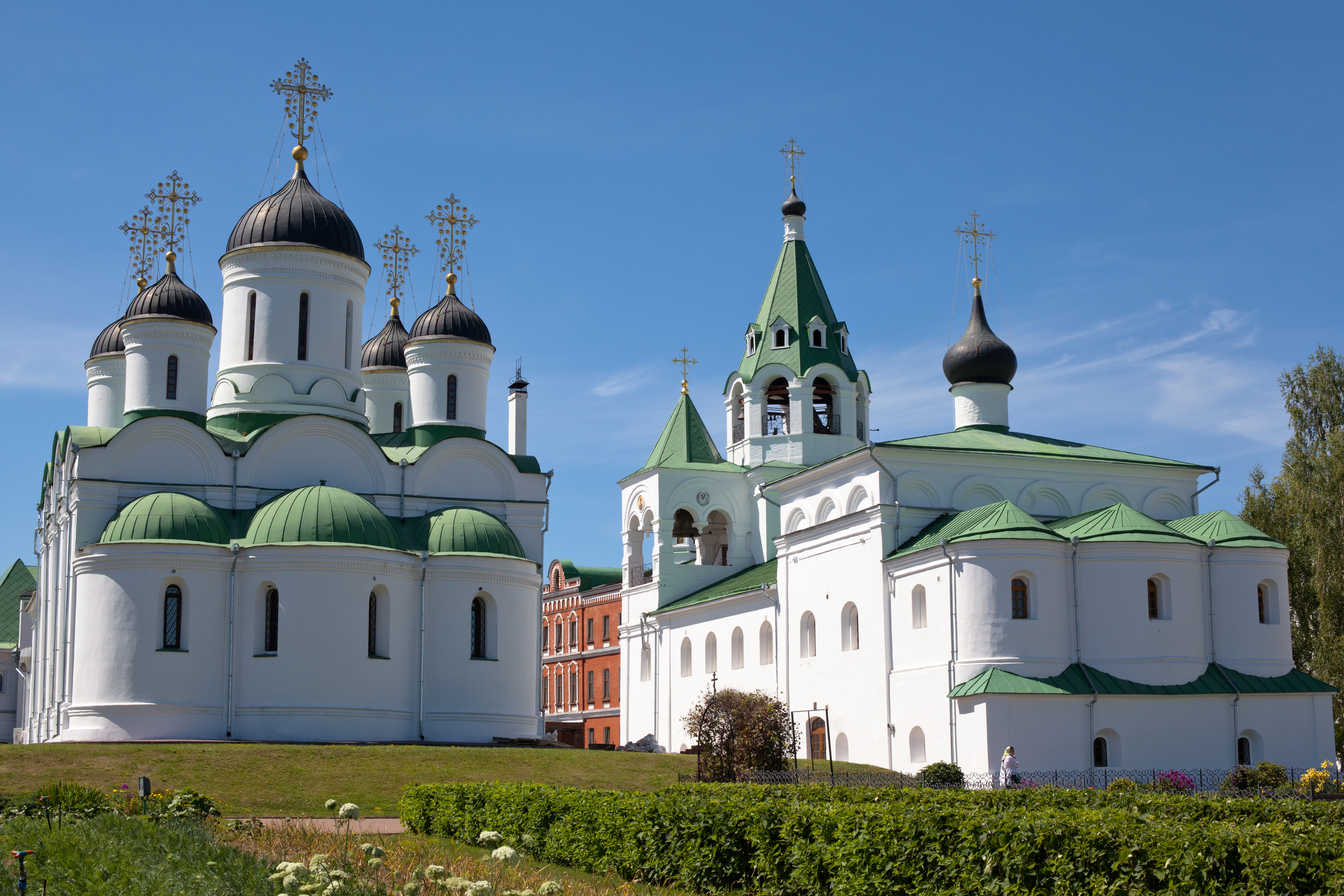 Ансамбль Спасо-Преображенского монастыря: улица Лакина, 1, Муром, Владимирская область